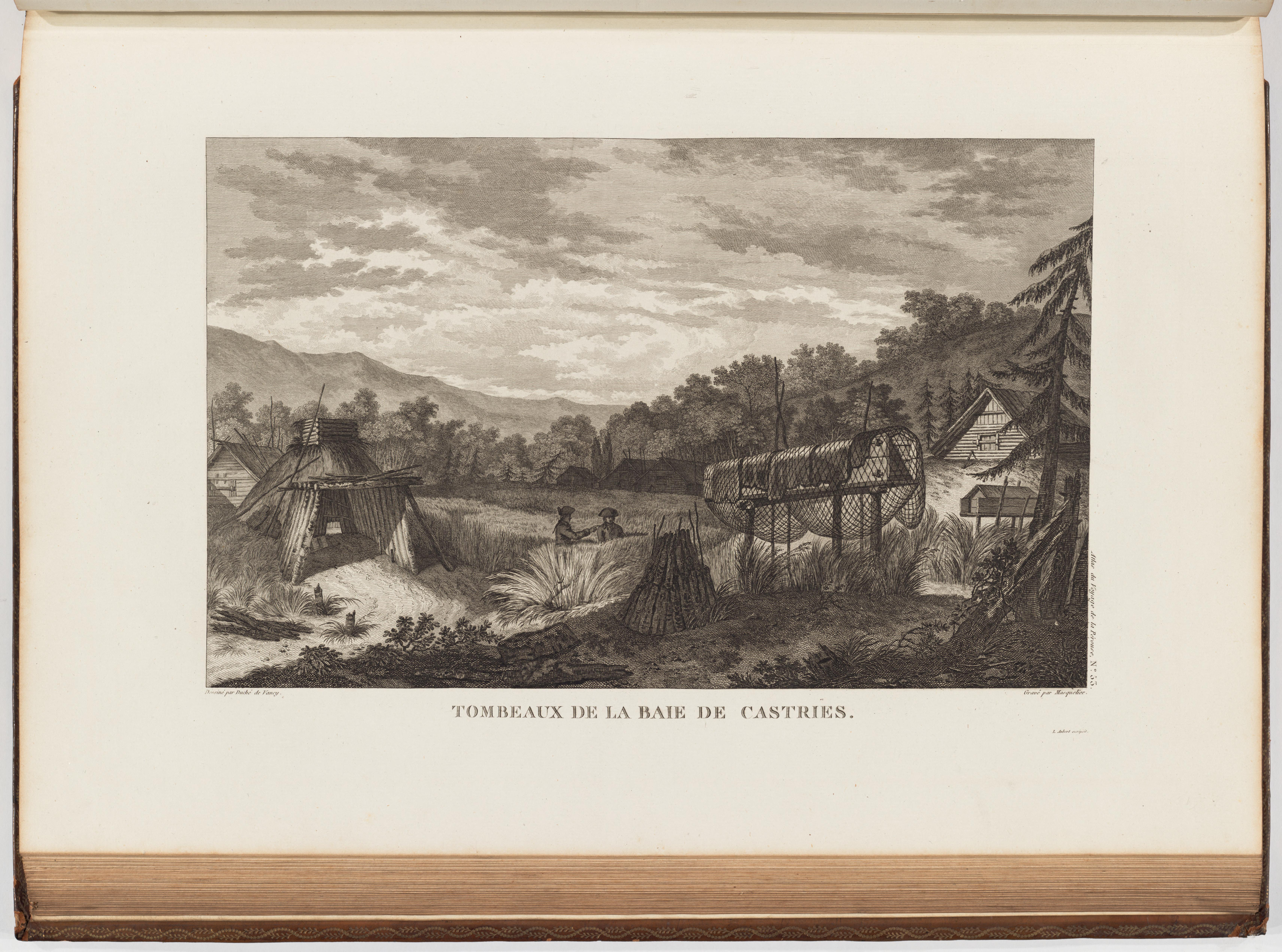 Voyage de La Pérouse autour du monde /publié conformément au décret du 22 avril 1791, et rédigé par L.A. Milet-Mureau.